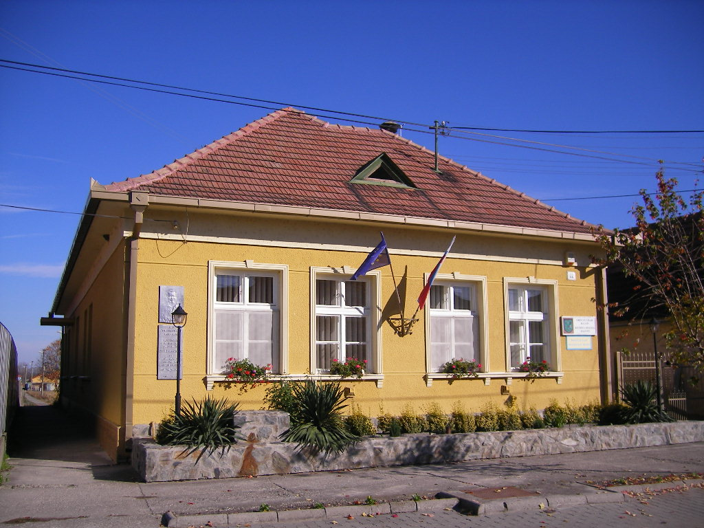 Balony - községháza